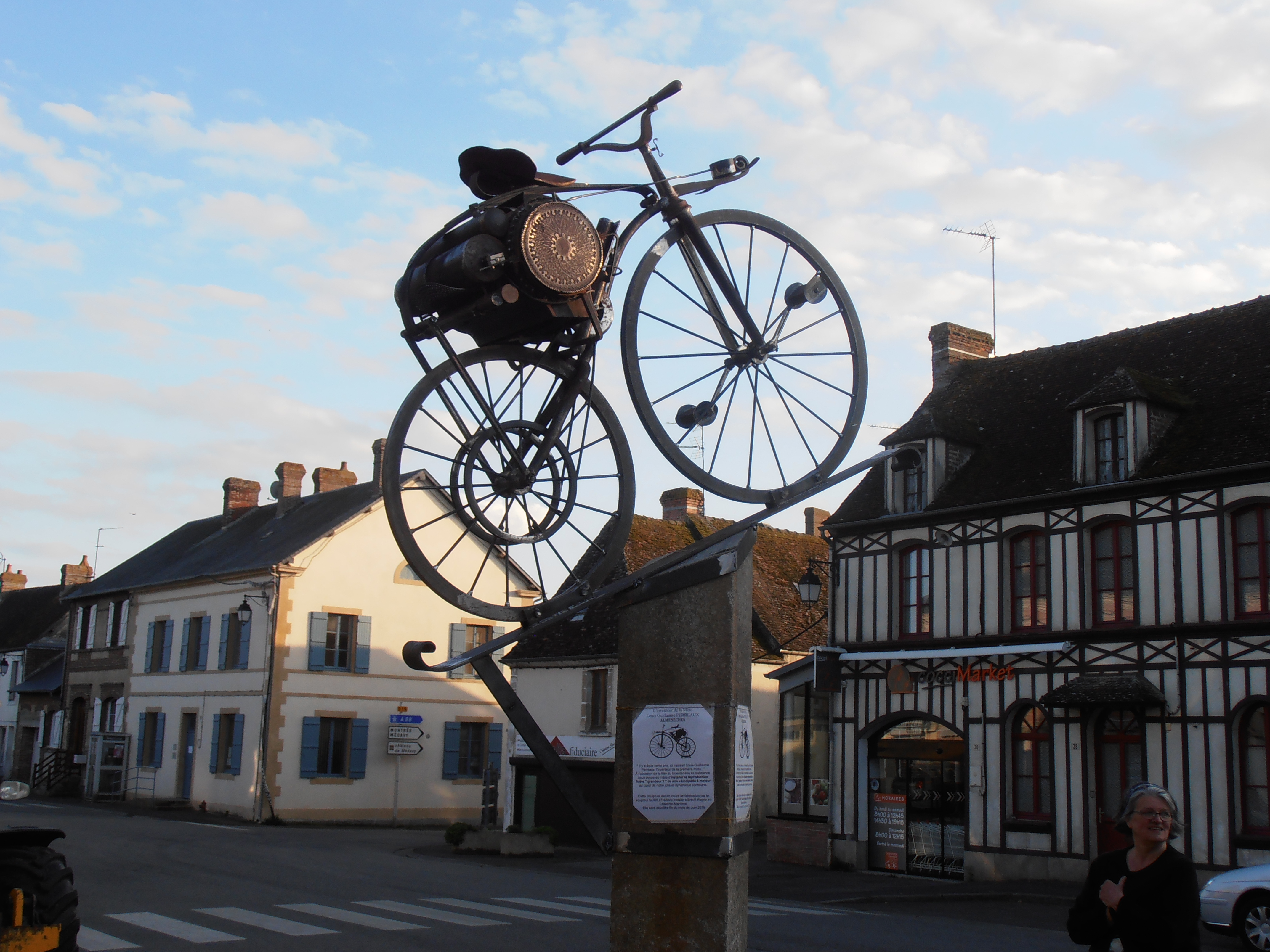 Sculpture de Mr NOBILI Fréderic